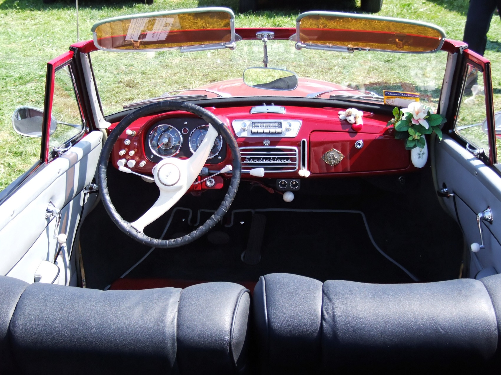 Quelle: selbst fotografiert, 04/2007 Fotograf: Späth Chr.